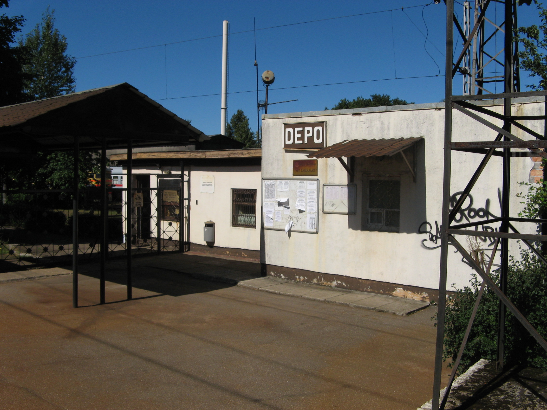 Zasulauka Depo train station